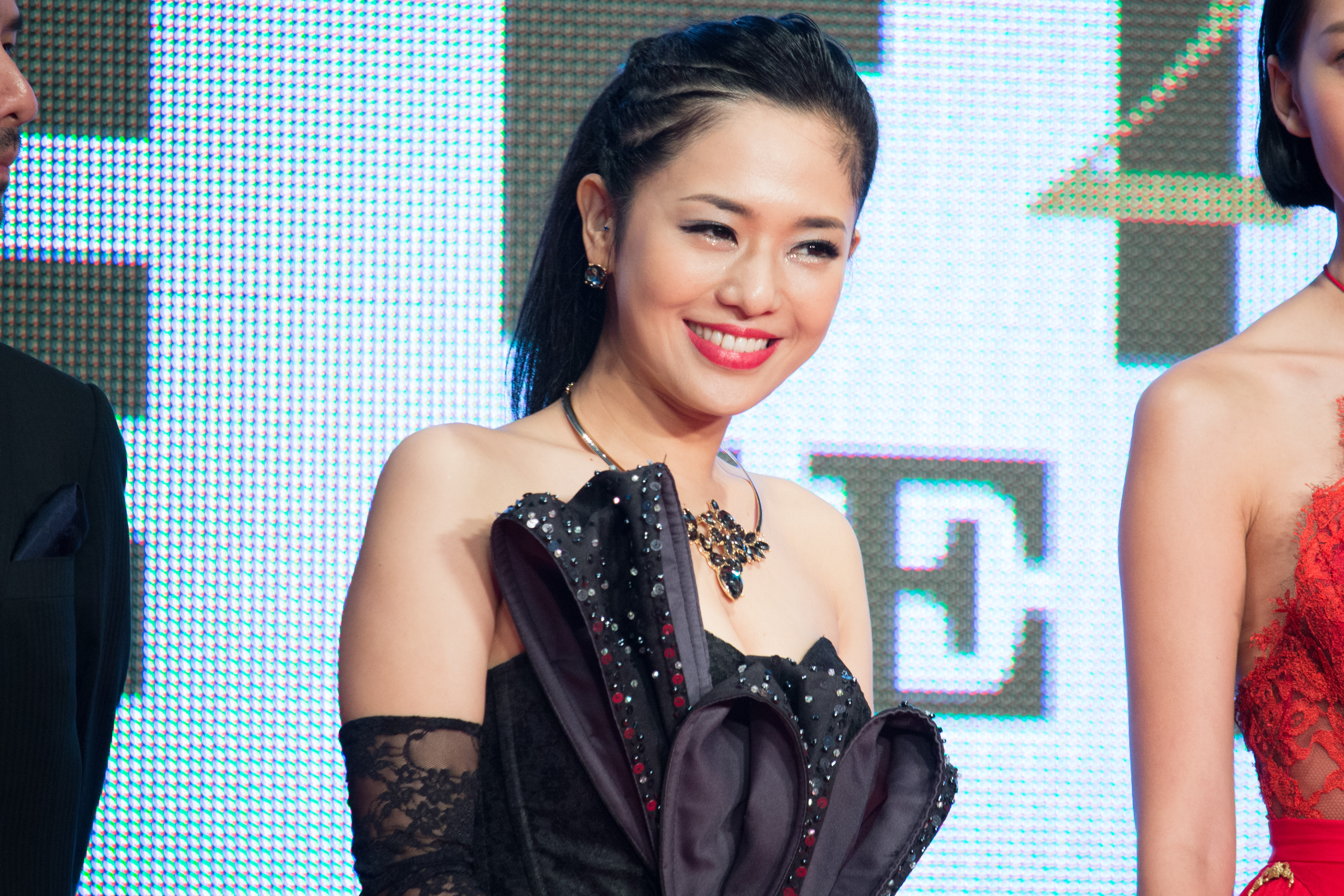 第28回 東京国際映画祭 オープニングセレモニー 蒼井そら (レイジー・ヘイジー・クレイジー)